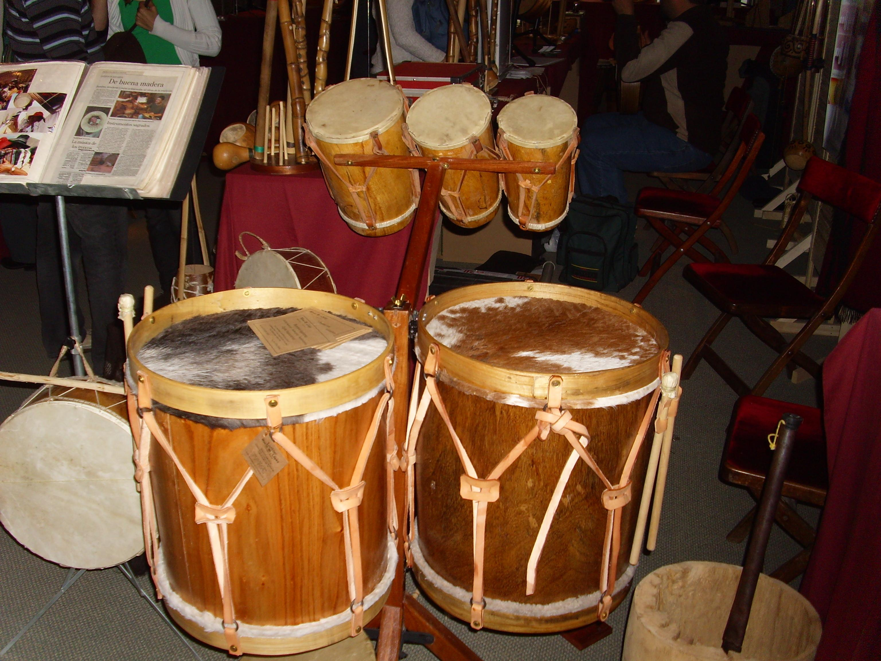 Me gusto ver los cuerpos armados, perdón al luthier por no anotar su nombre.